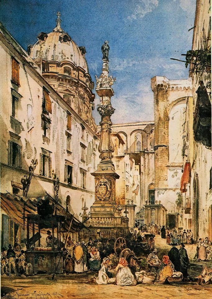 Giacinto Gigante - Piazzetta Riario Sforza con Guglia di San Gennaro.